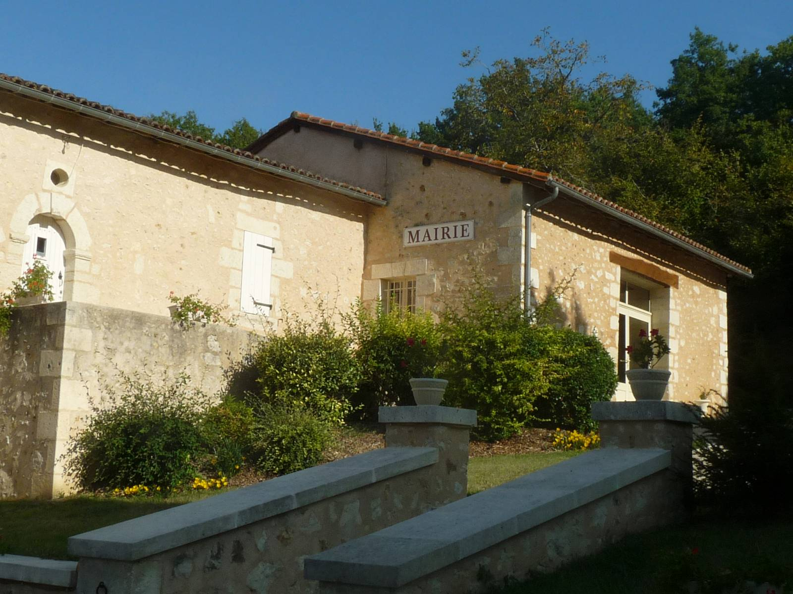 mairie de St-Avit (16), France